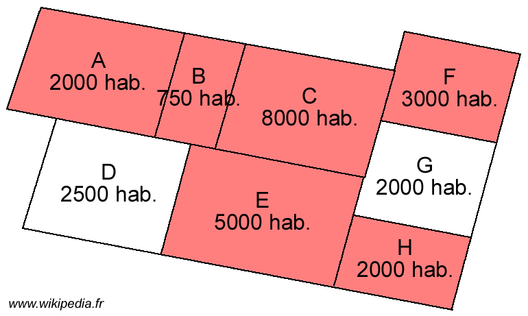 Schéma illustrant l'article sur la notion d'unité urbaine (4 sur 6)